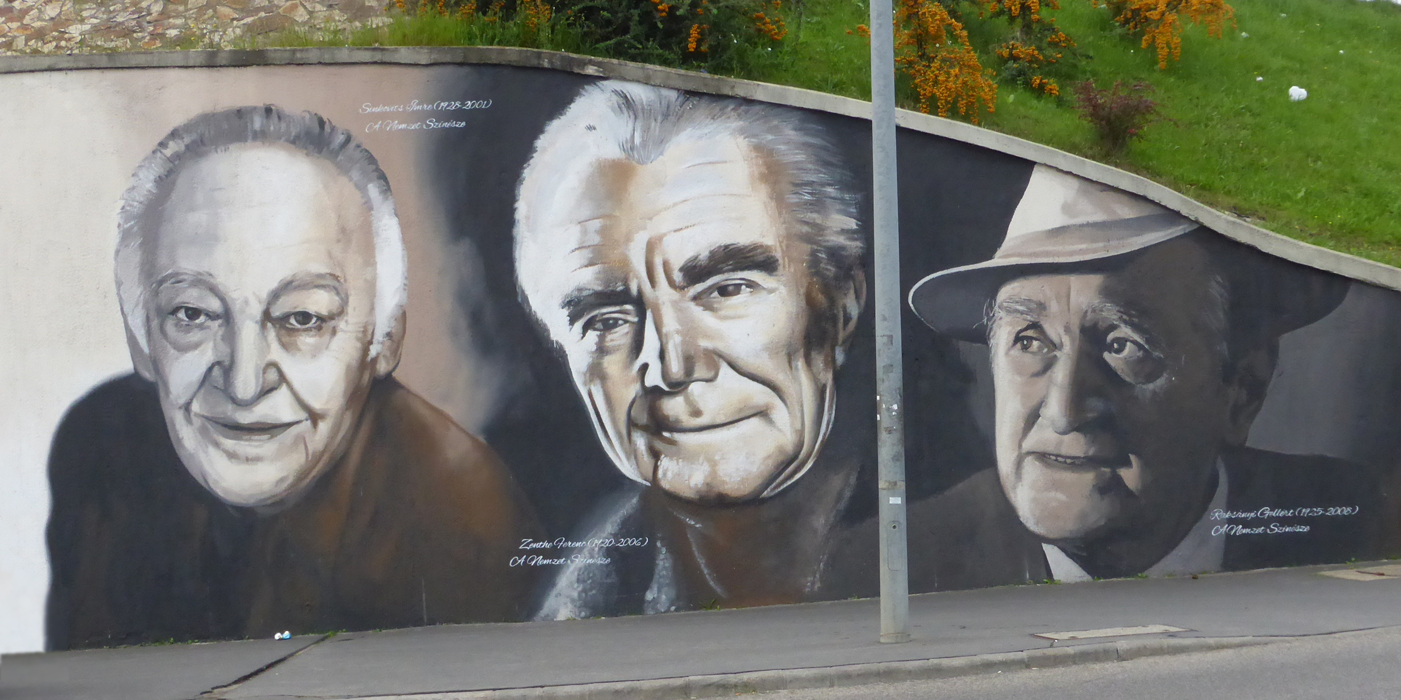 Bilder der Nationalschauspieler Raksányi Gellért, Zenthe Ferenc und Sinkovits Imre (von rechts nach links) an der Rákóczi-Brücke in Budapest.